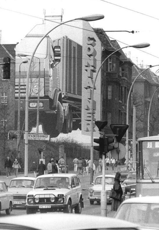 ADN-ZB-Uhlemann-7.8.88-Berlin: Fassadenmalerei- Der Lichtenberger Keramikmaler Lothar Scholz gestaltete diese Giebelmalerei am Containerbahnhof Frankfurter Allee.